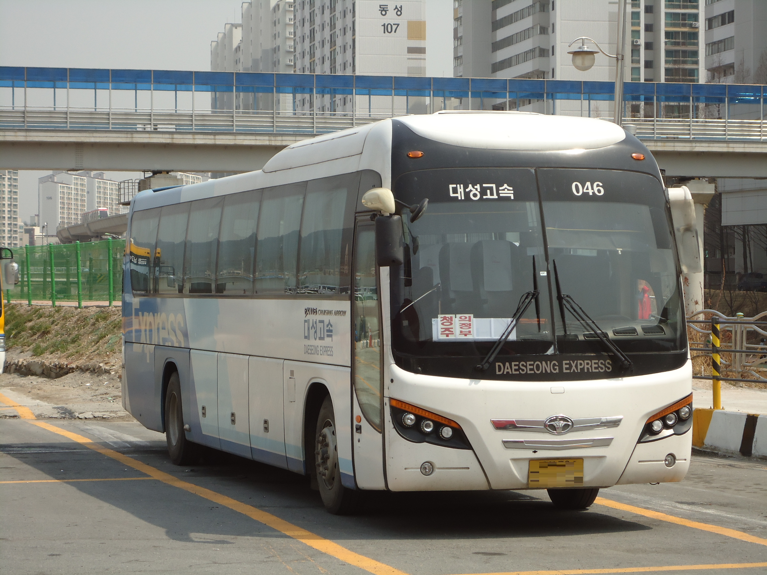 대성고속 FX116 크루징 애로우